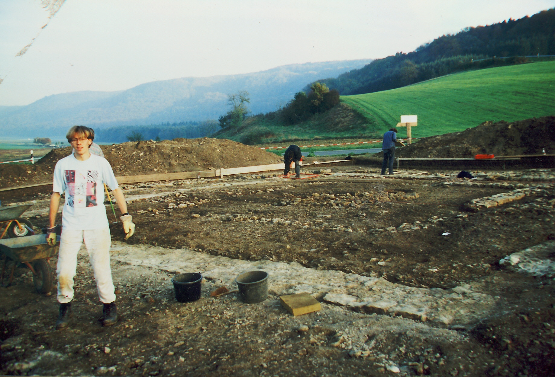 Gallo-römischer Umgangstempel in der Landschaft Klettgau vor der Küssaburg in Baden-Württemberg / Deutschland. Die Fundamente wurden im Sommer 1995 in einer von dem Archäologen Jürgen Trumm geleiteten Ausgrabung freigelegt.